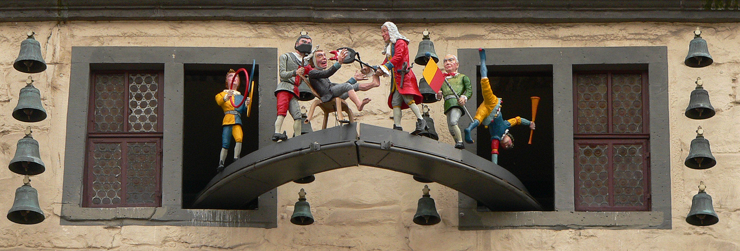 Glockenspiel am Rathhaus Hann. Münden Dr. Eisenbart